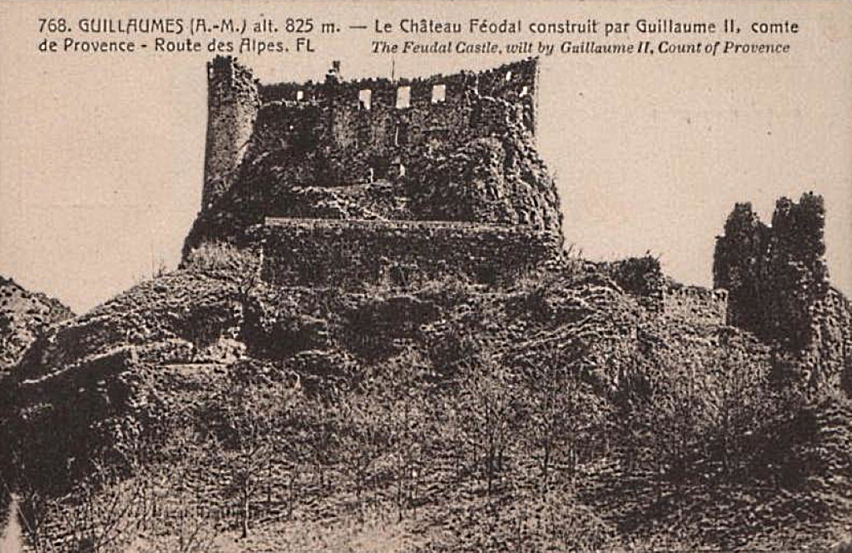 Carte postale ancienne du château de Guillaumes, Alpes-Maritimes éditée vers 1900.